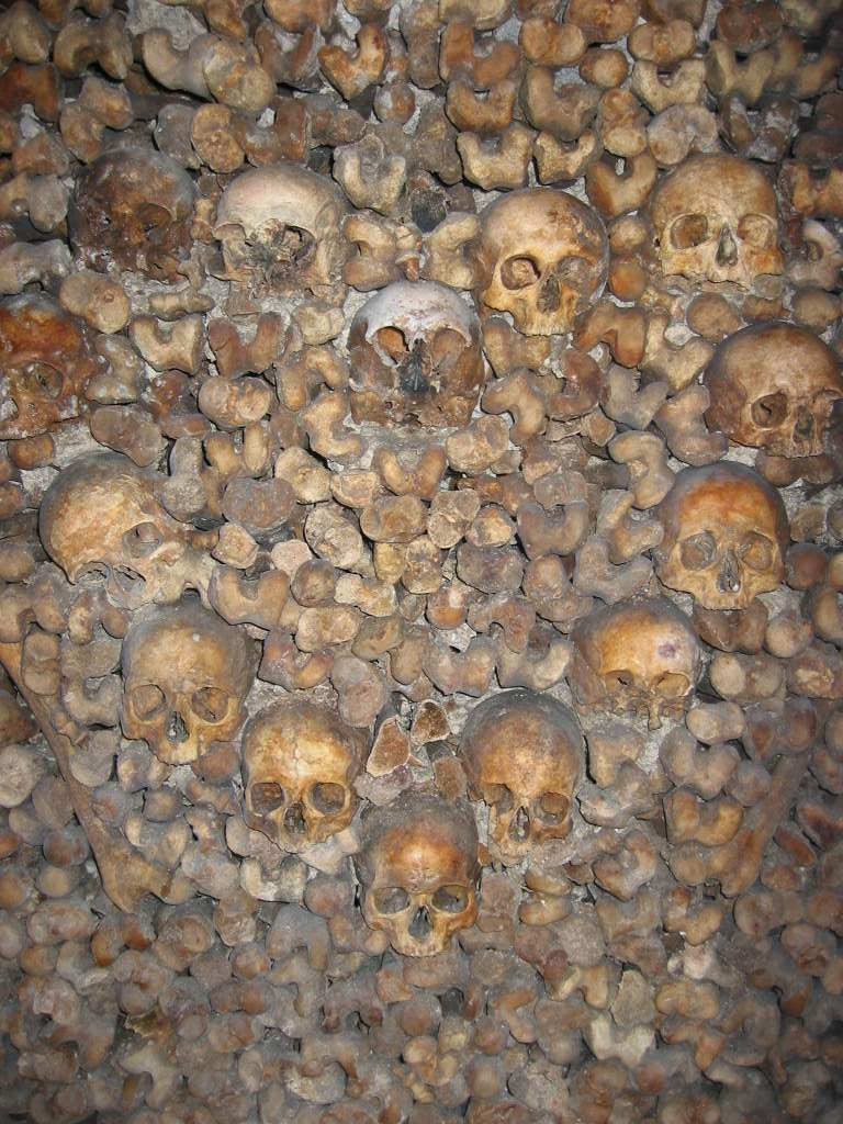 coeur de cranes - catacombes de Paris